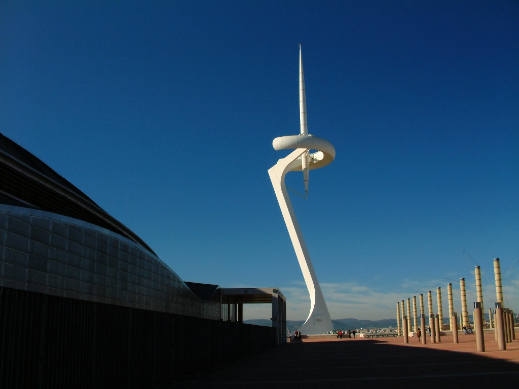 Descripción: Torre de telecomunicaciones de Montjuïc (Telefónica) Barcelona del arquitecto Santiago Calatrava Fecha: 30/11/2002 Hora: 12:00 Cámara: FinePix 6900Z ISO: 100 Tv: 1/200 Av: 7 Autor: aTarom